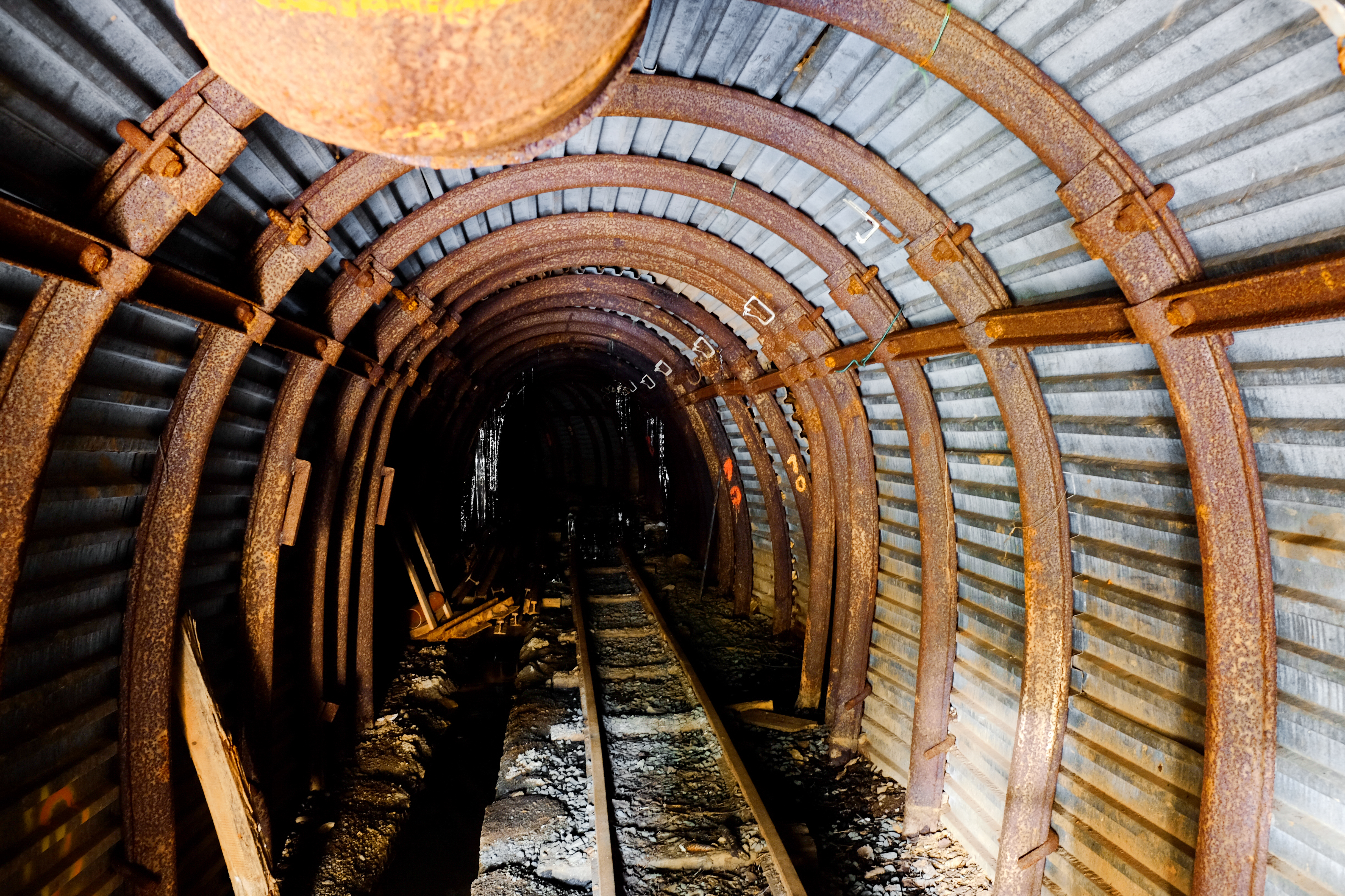 Důl Jeroným, odvodňovací štola v údolí Chalupeckého potoka, Čistá, Slavkovský les, okres Sokolov